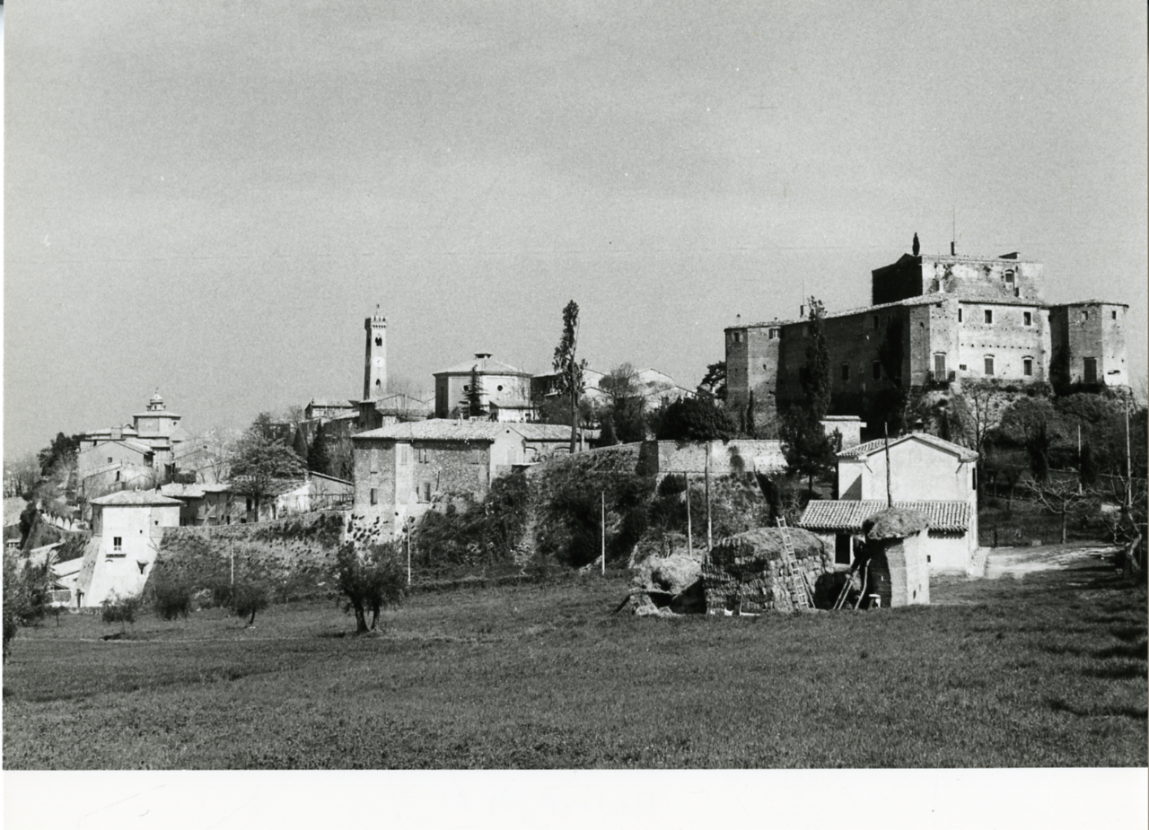 Servizio fotografico : Santarcangelo di Romagna, 1972 / Paolo Monti. - Stampe: 3 : Positivo b/n, gelatina bromuro d'argento/ carta, 24x30. - ((Al verso delle stampe manoscritti i numeri dei negativi corrispondenti: 1852/20, 2041/21, 2041/37. Sul coperchio della scatola, manoscritto a pennarello: "Architettura/ Castelli". - Occasione: Campagna di rilevamento del centro storico e altri beni artistici e culturali del territorio. - Fonte: Fattura di Paolo Monti: Emilia-Romgana centri storici/ Fattura n. 42 (1972/12/22), presso Archivio Paolo Monti